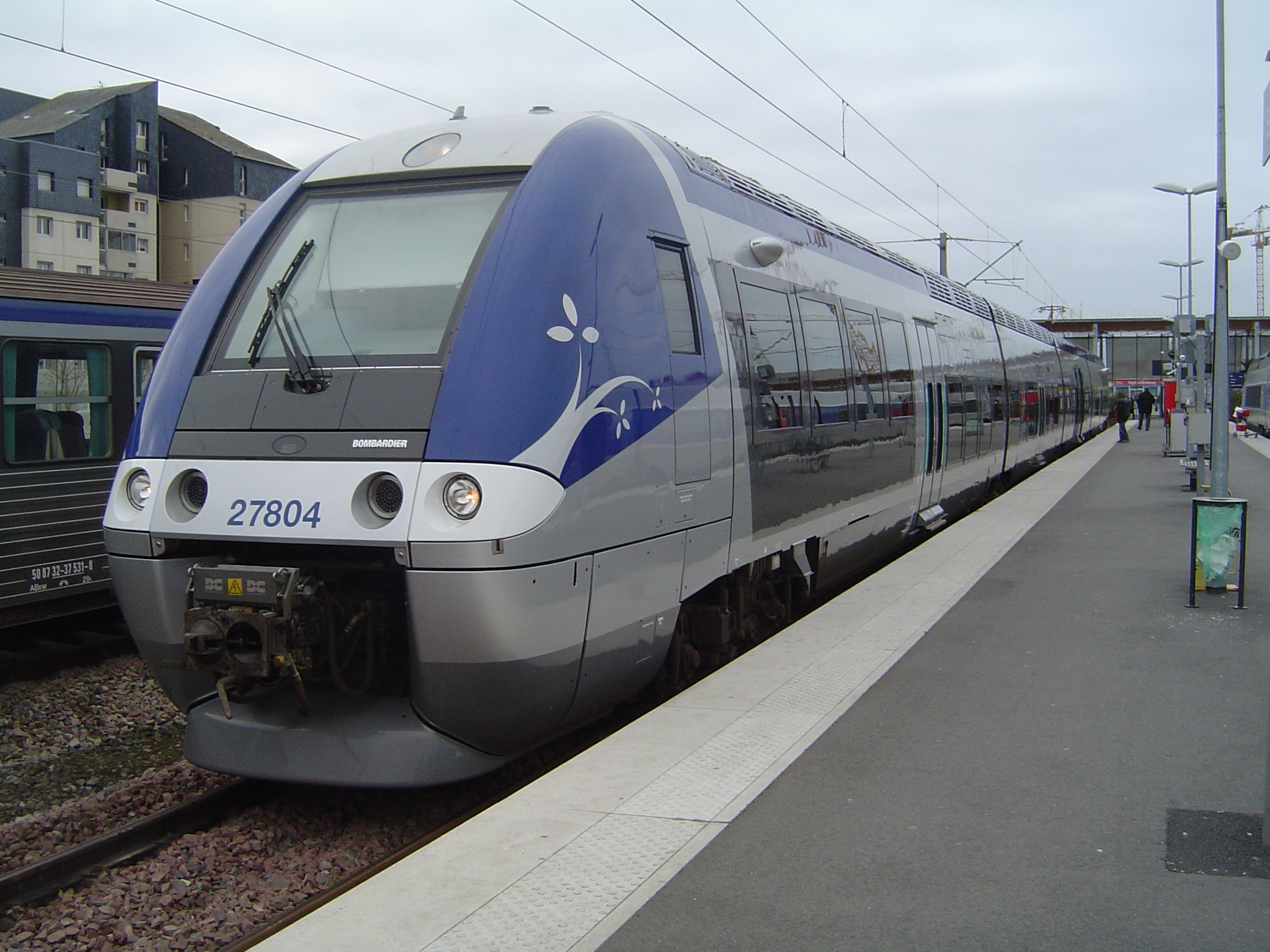 Automotrice électrique Z 27804 en gare de Saint-Malo